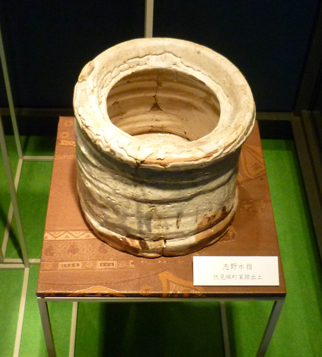 Mizusashi (récipient à eau froide pour cérémonie de thé), Japon.